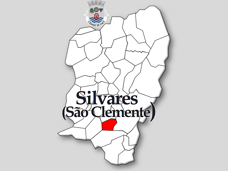 Censos 1864/2011